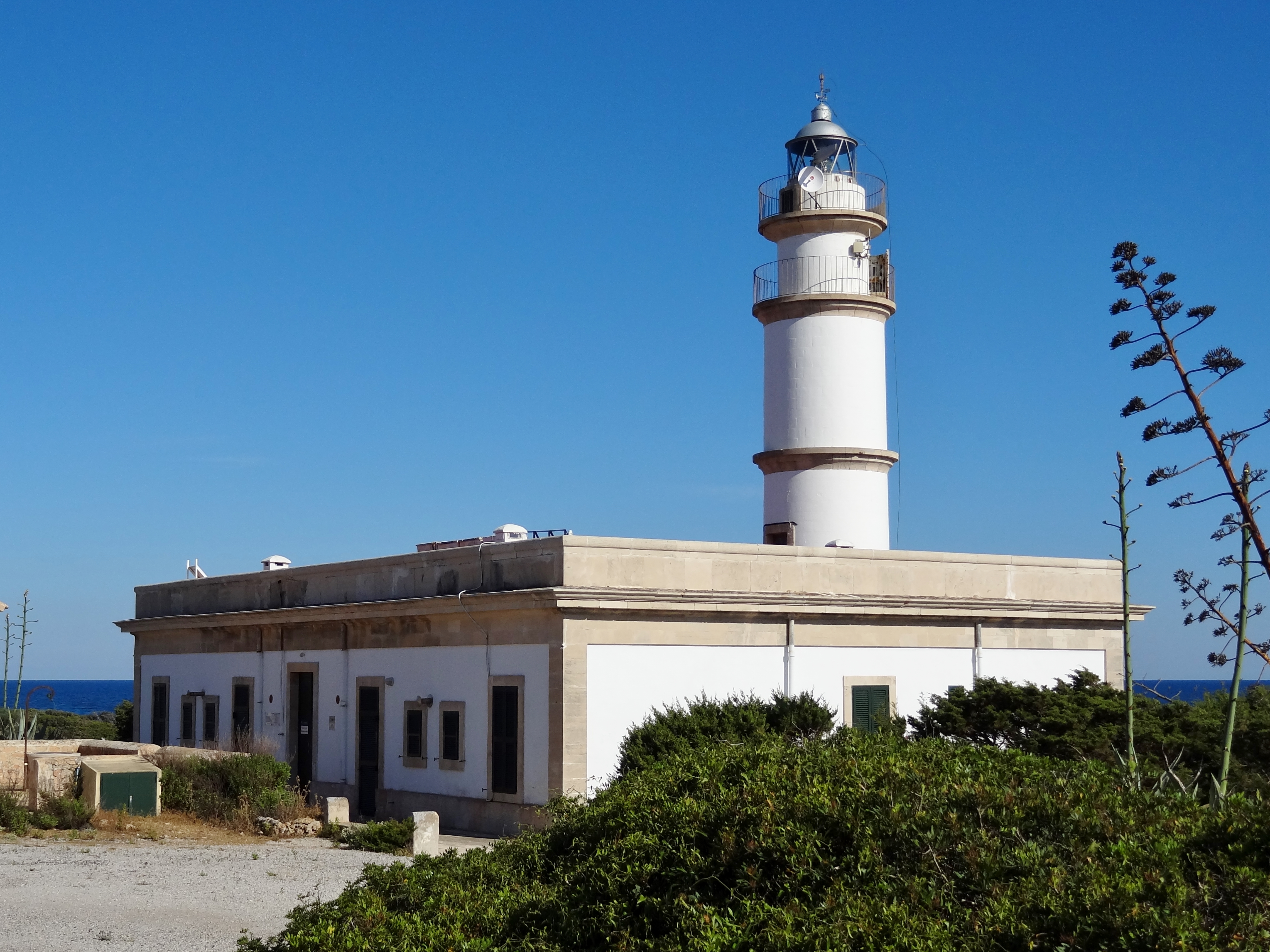 Leuchtturm am Cap de ses Salines an der Südküste Mallorcas, Spanien